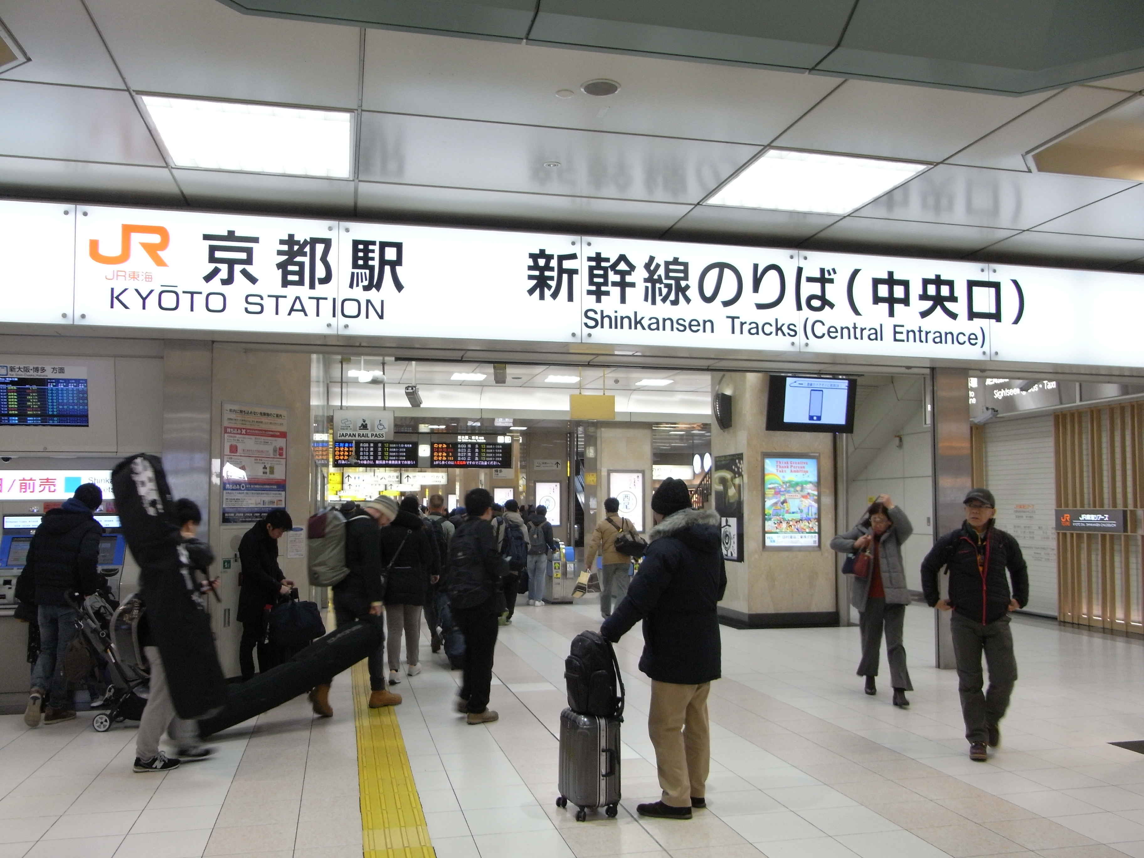 東海道新幹線京都駅中央改札